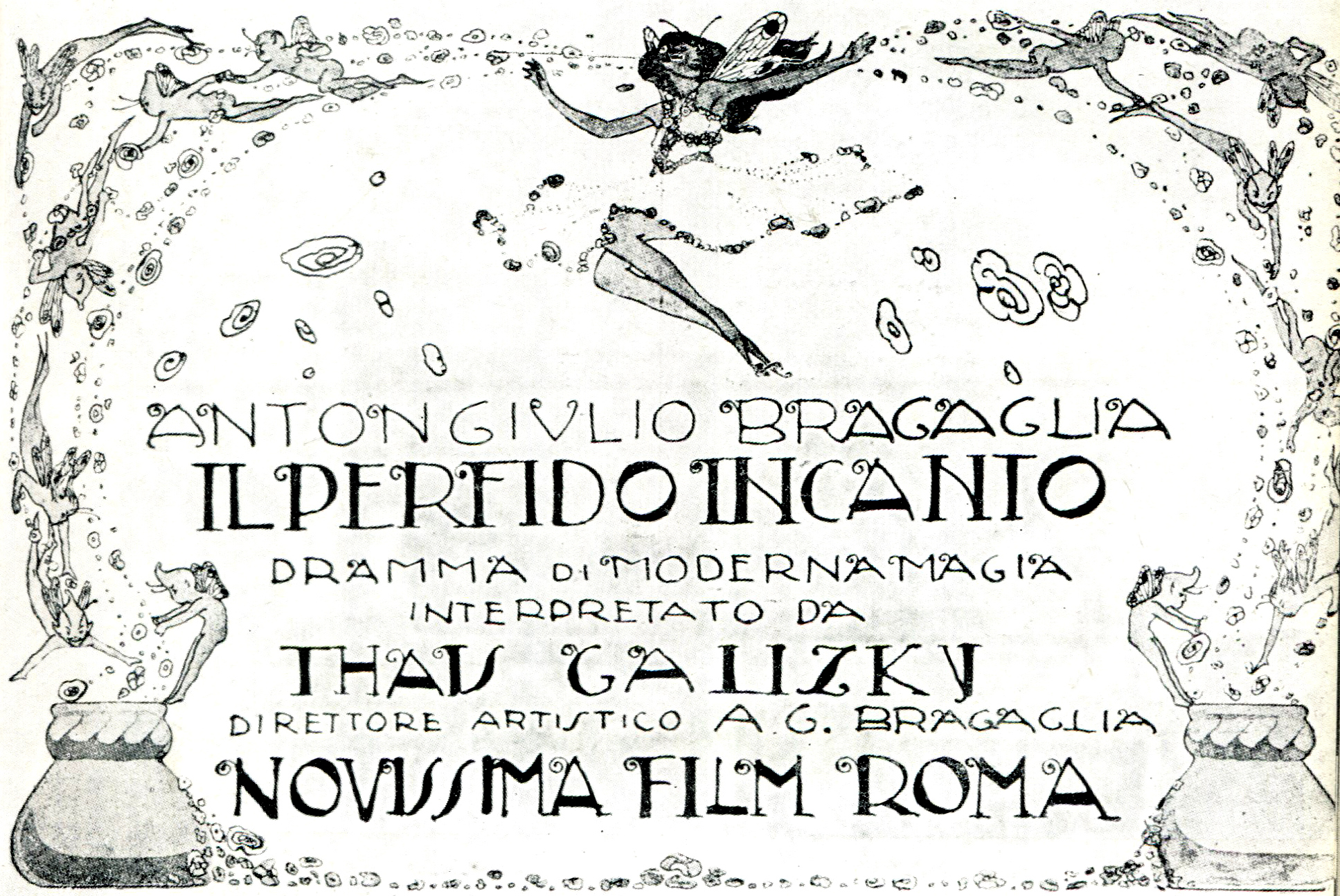 Flano promozionale di Perfido incanto - regia di Anton Giulio Bragaglia 1917 - Produz. "Novissima Film" Roma